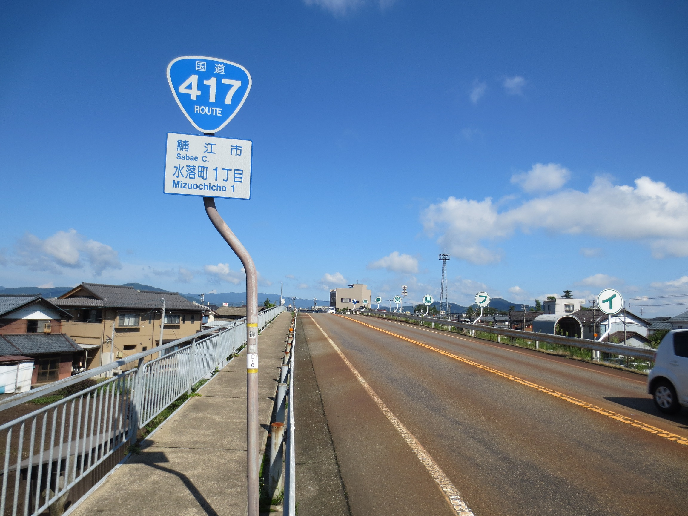 鯖江市水落町 水落駅付近の国道417号。